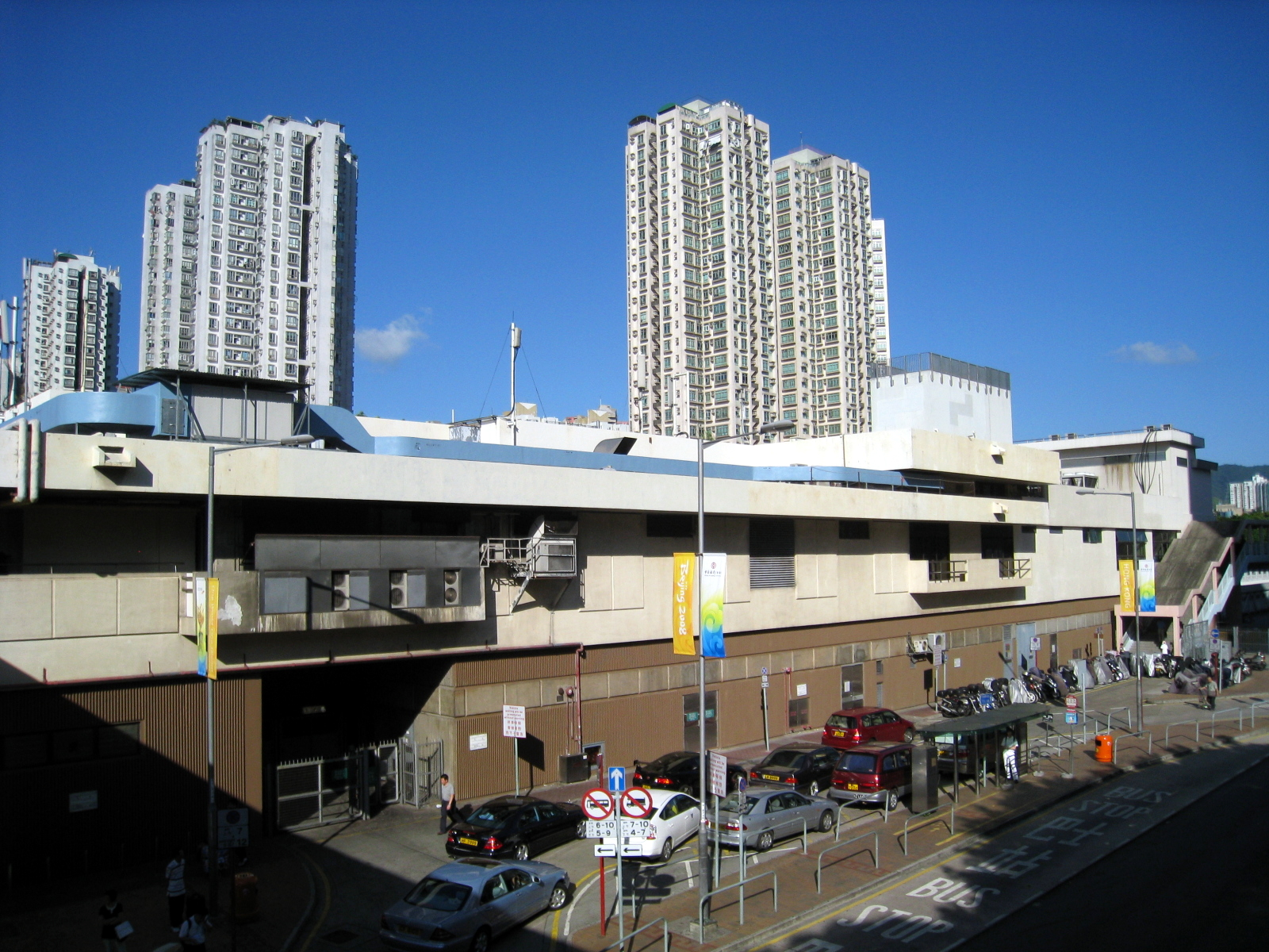 Sheung Shui Station Outside 上水站外觀(彩園路)